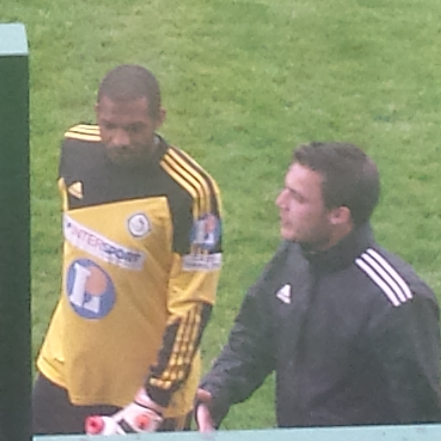 Yoann Djidonou (en jaune ; à gauche), avec un coéquipier, lors du match Arras / Romorantin, le 25 avril 2015, au Stade Degouve-Brabant d'Arras, comptant pour la vingt-sixième journée du championnat de France amateur de football ou CFA (quatrième division française).